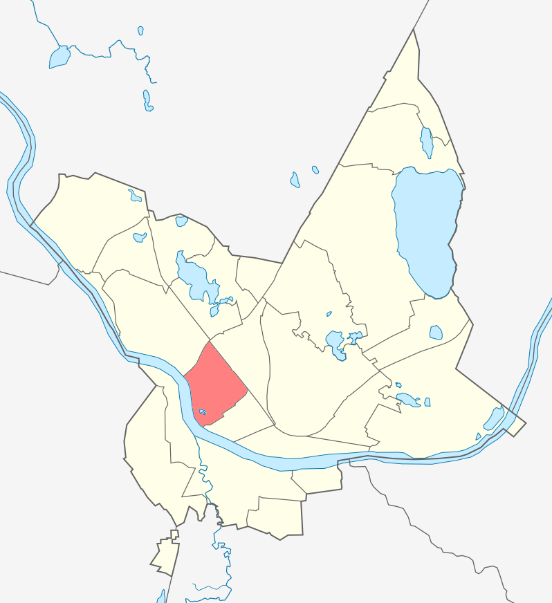 Микрорайон Эспланада карте Даугавпилса.